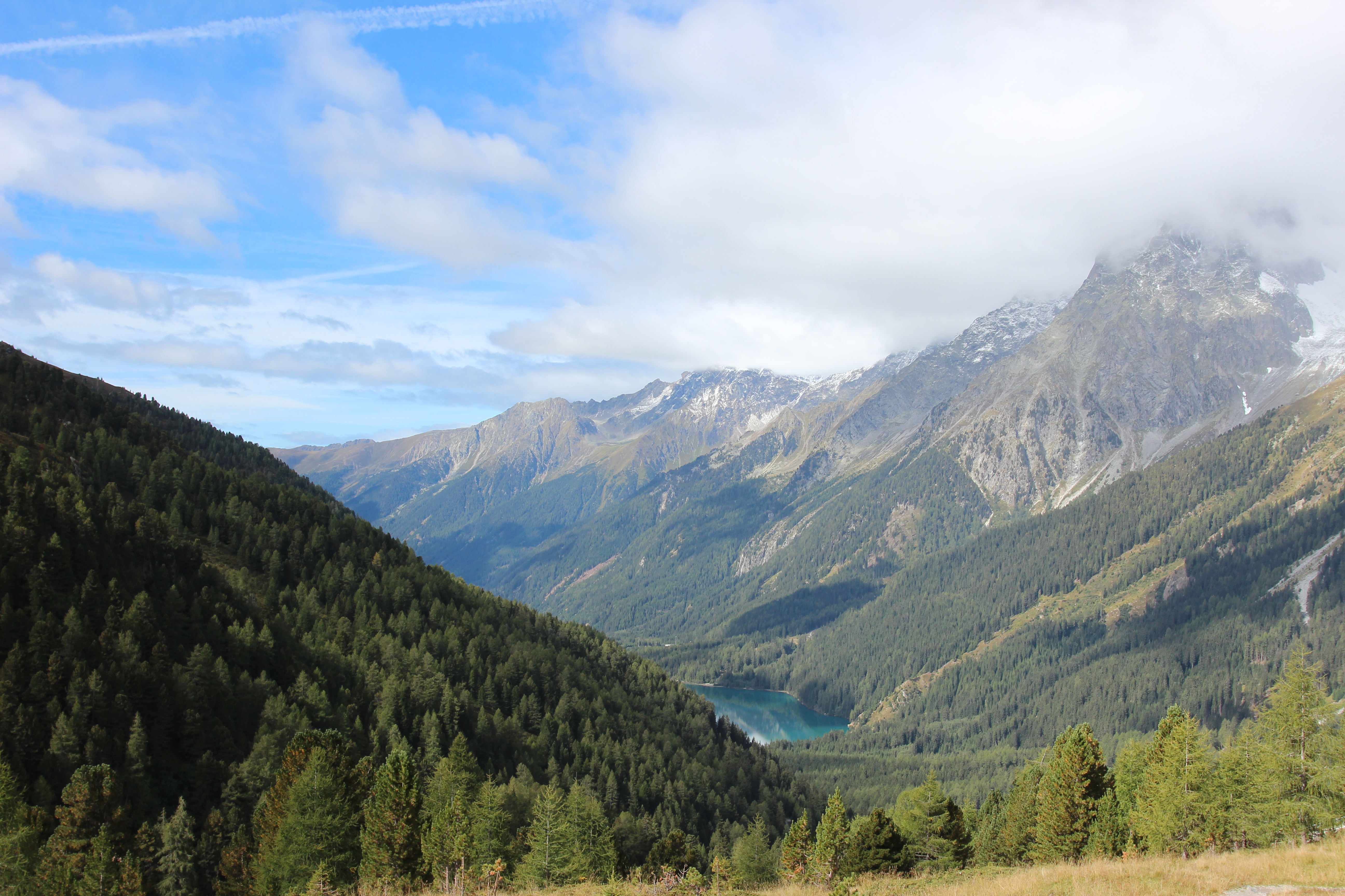 Antholzer See vom Staller Sattel aus gesehen.